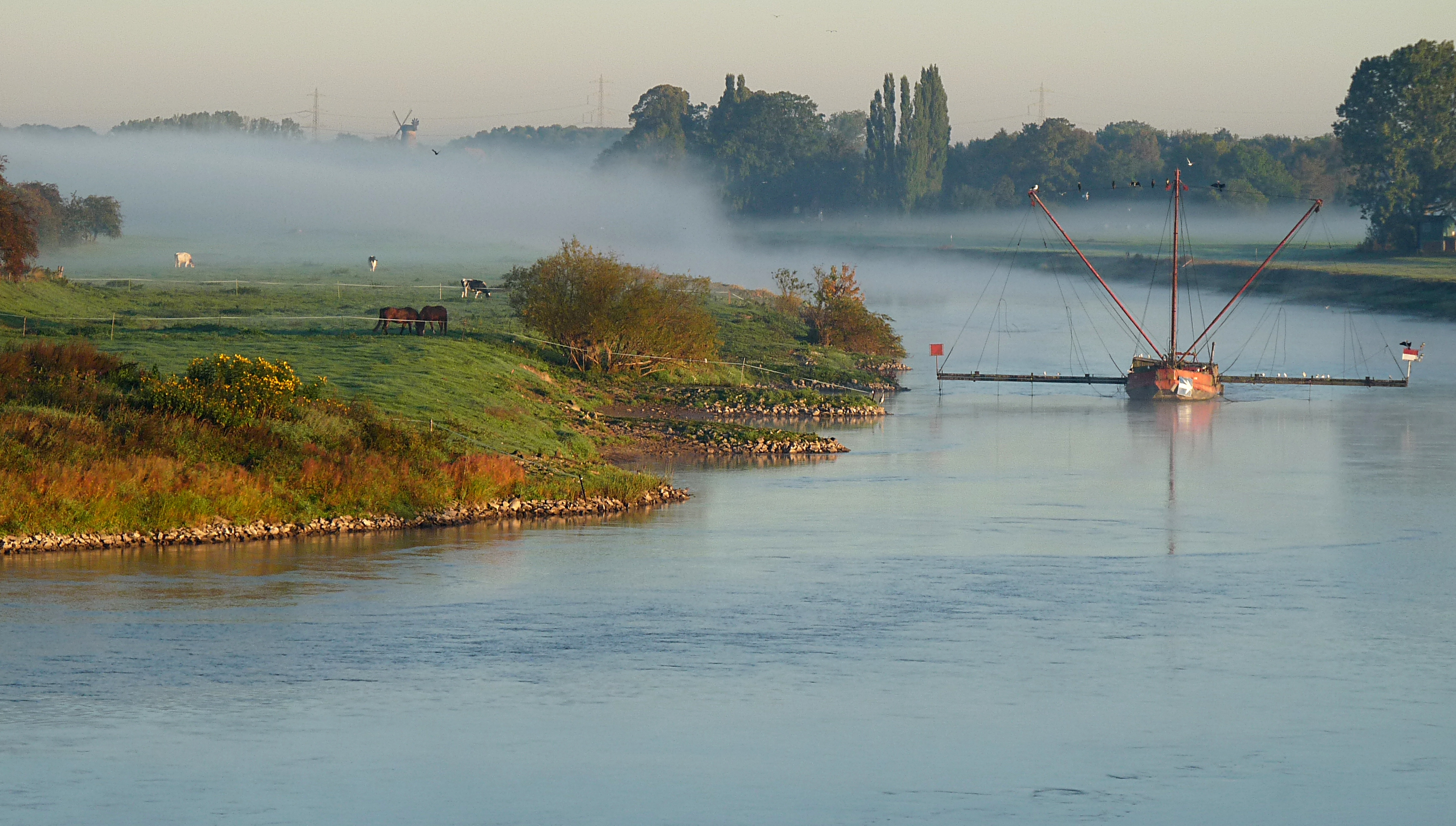 Blick von der Staustufe Petershagen Richtung Norden in die Weseraue, im Vordergrund der Aalfänger, im Hintergrund die Pottmühle an der Kreisstr. 1; abgebildeter Bereich im Naturschutzgebiet „Weseraue“ (NSG MI-002) in Petershagen, Regierungsbezirk Detmold in Nordrhein Westfalen